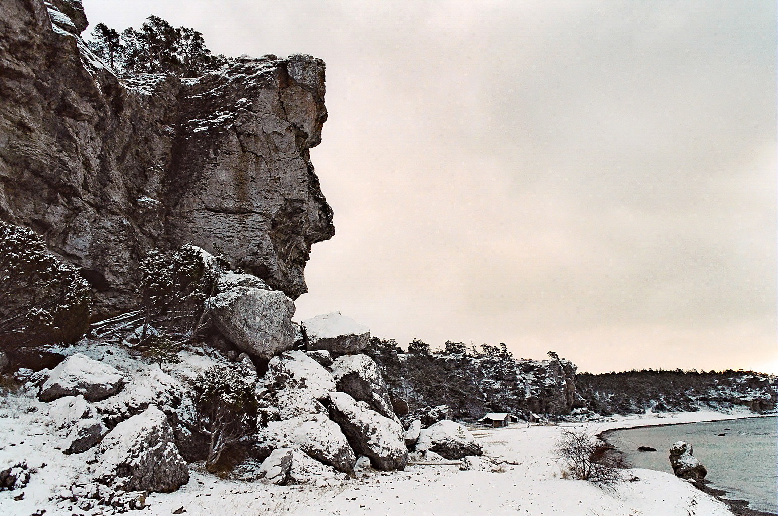 Rauk på Sigsarve strand på norra Gotland.